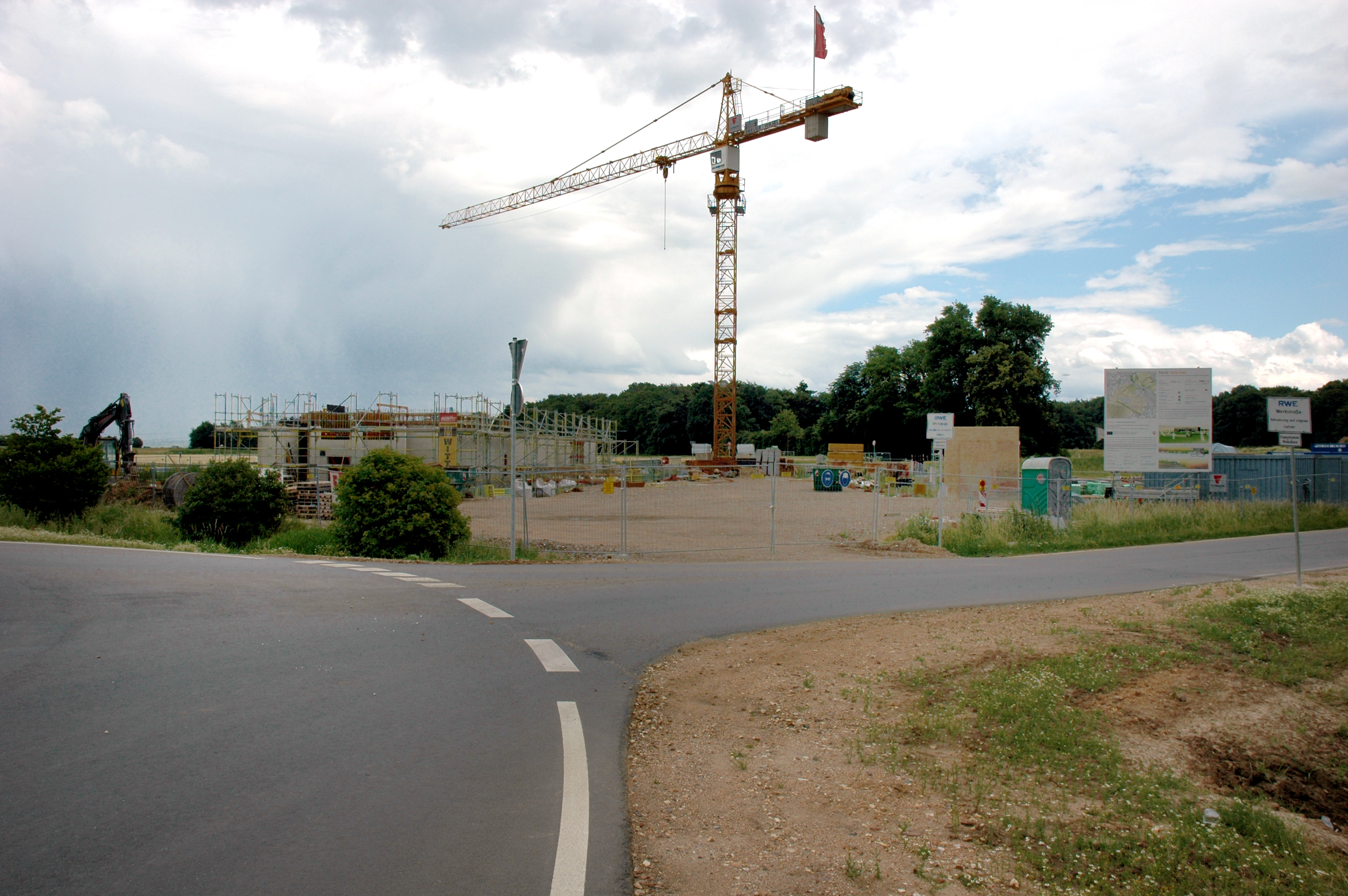 Baustelle des Tagebau-Besucherzentrums Forum :terra nova am Tagebau Hambach bei Elsdorf